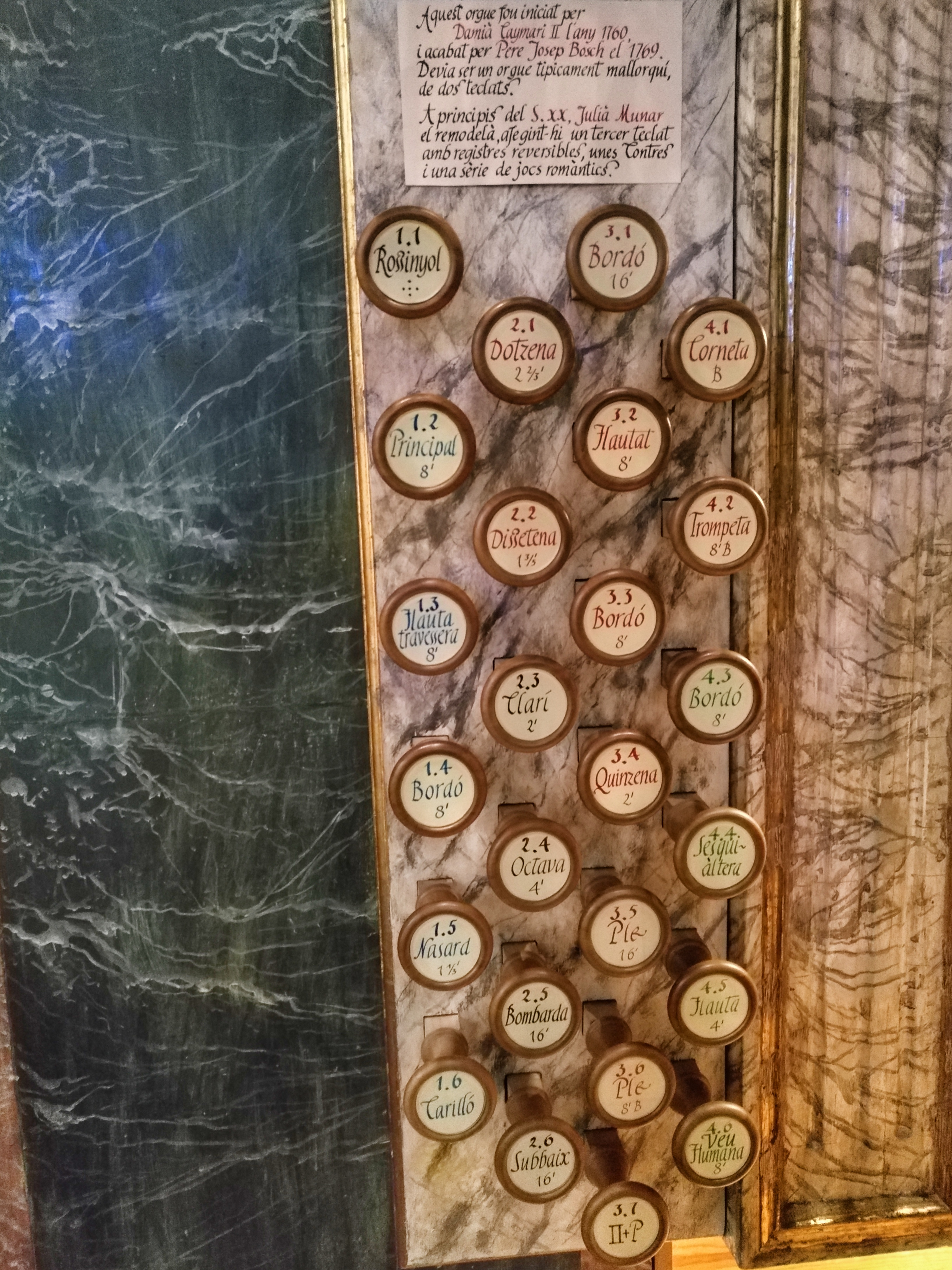 Orgue Santa Creu Palma. Registres de l'esquerra